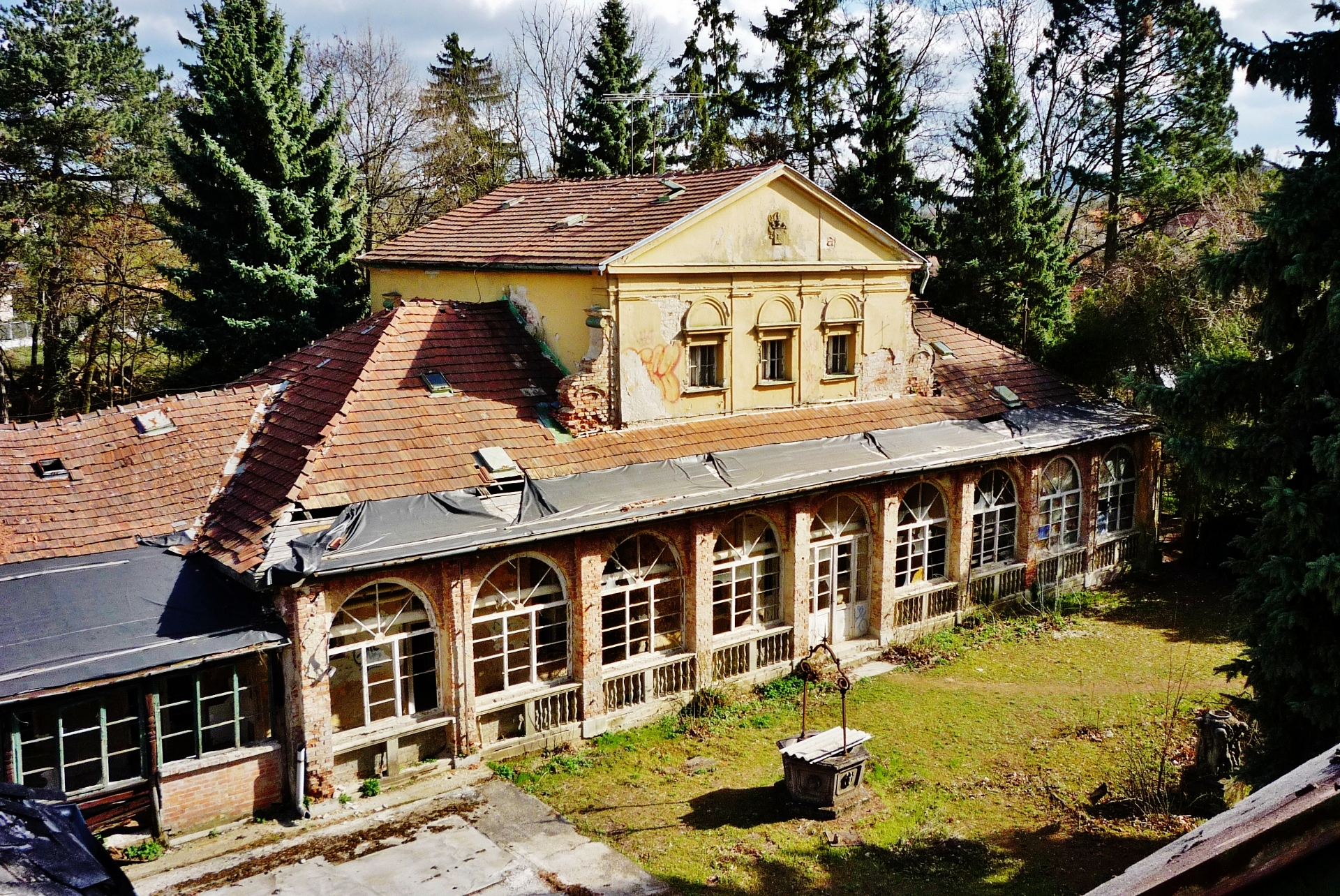 Klebelsberg villa